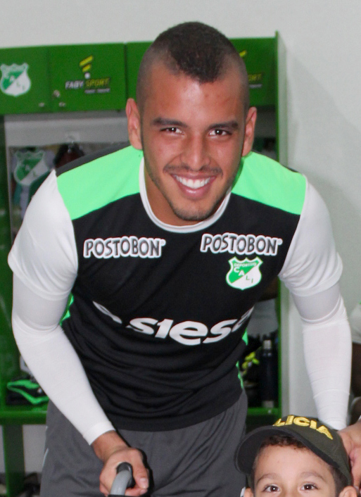 ‘Sebastián Cardona es un niño de 10 años con Artrogriposis múltiple congénita al que la Policía de Infancia y Adolescencia de Cali le cumplió un sueño. Todo inicia cuando en el evento de la celebración del día mundial de las enfermedades raras, Catalogada como una de las enfermedades huérfanas este grupo de la Policía conoció la historia del niño y decidió cumplirle su sueño de conocer a los jugadores del Deportivo Cali y poder entrar a los camerinos del equipo de futbol, además de recibir por parte de todos un balo firmado por cada uno de los jugadores y la camiseta original del equipo del cual es hincha. Sebastián quien quiere ser arquero de futbol cumplió su sueño y agradeció a los uniformados por esta labor.’